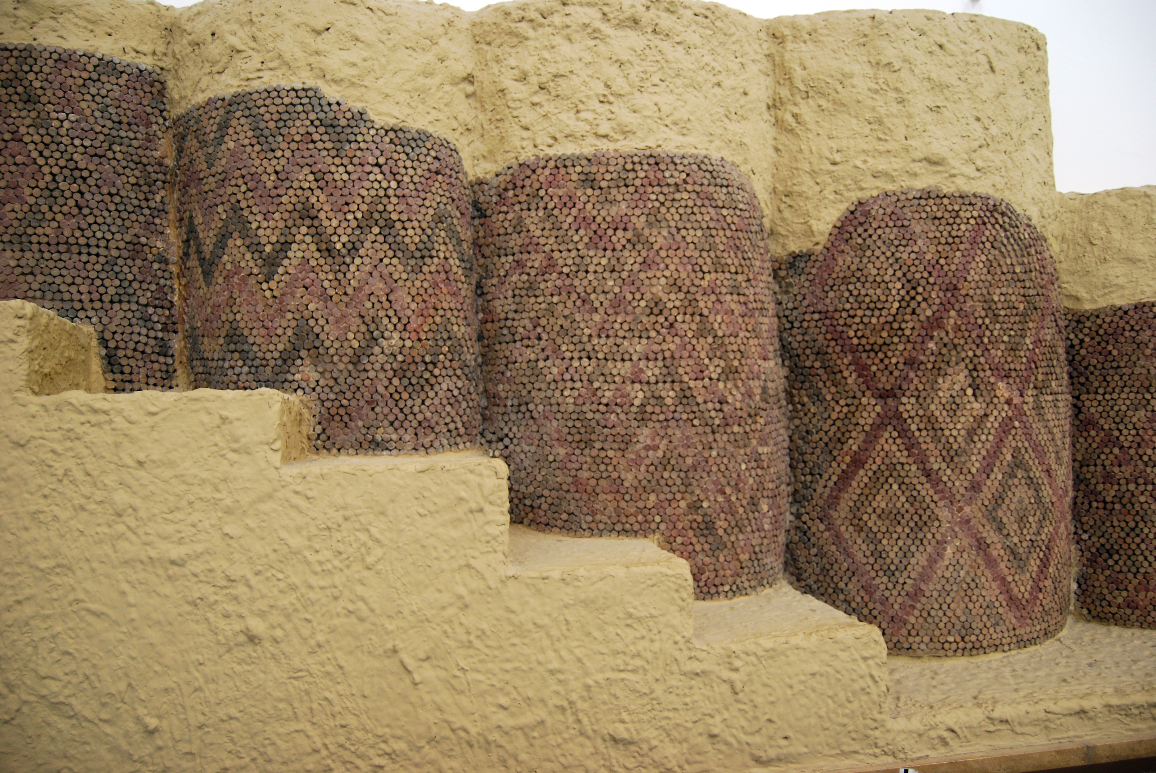 Pergamonmuseum